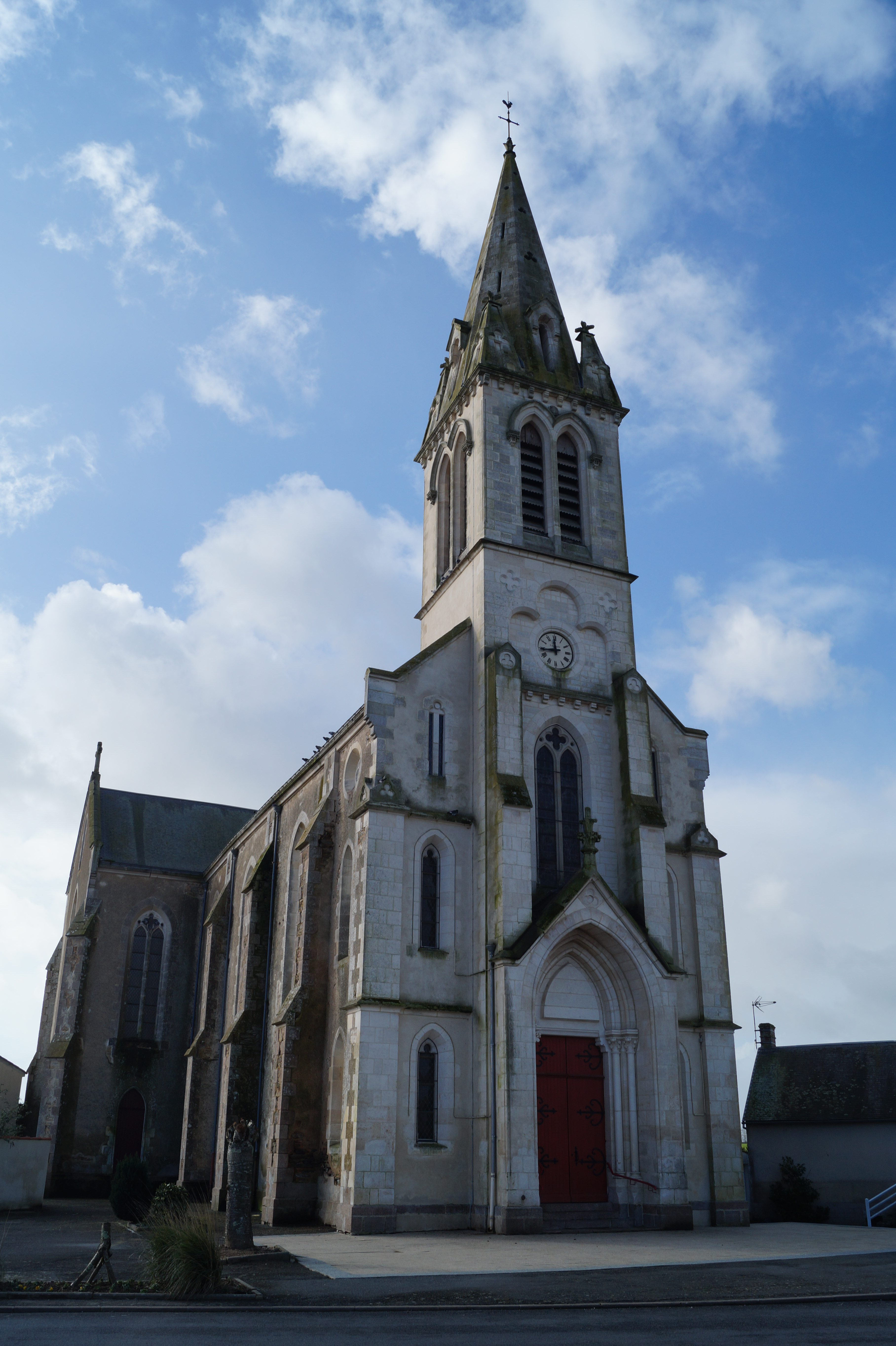 L’église Notre-Dame-de-la-Nativité de Château-Guibert depuis la place de l’Église.